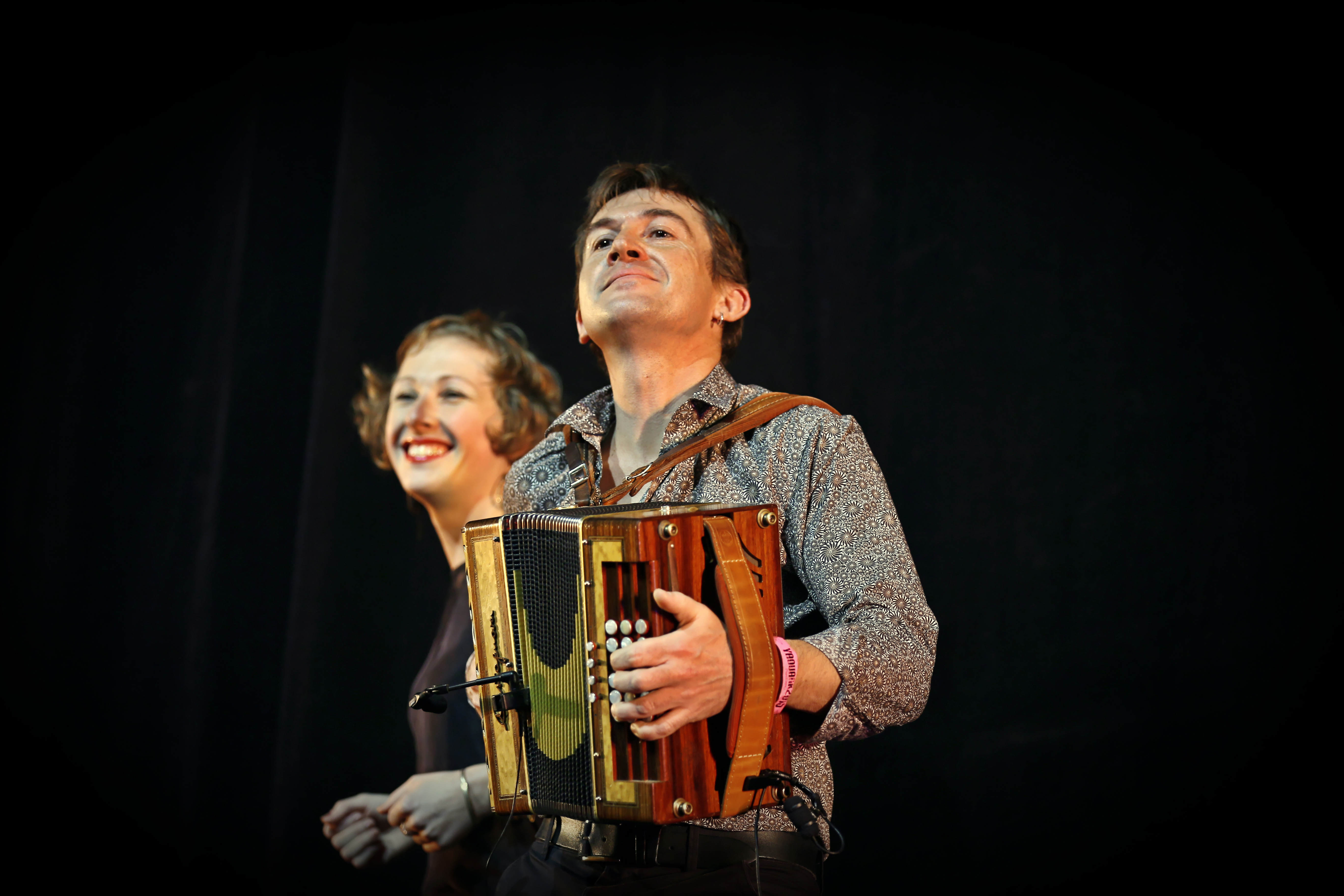 Rozenn Talec et Yannig Noguet en fest-noz lors du festival Yaouank le 21 novembre 2015 au Parc des Expositions de Rennes.